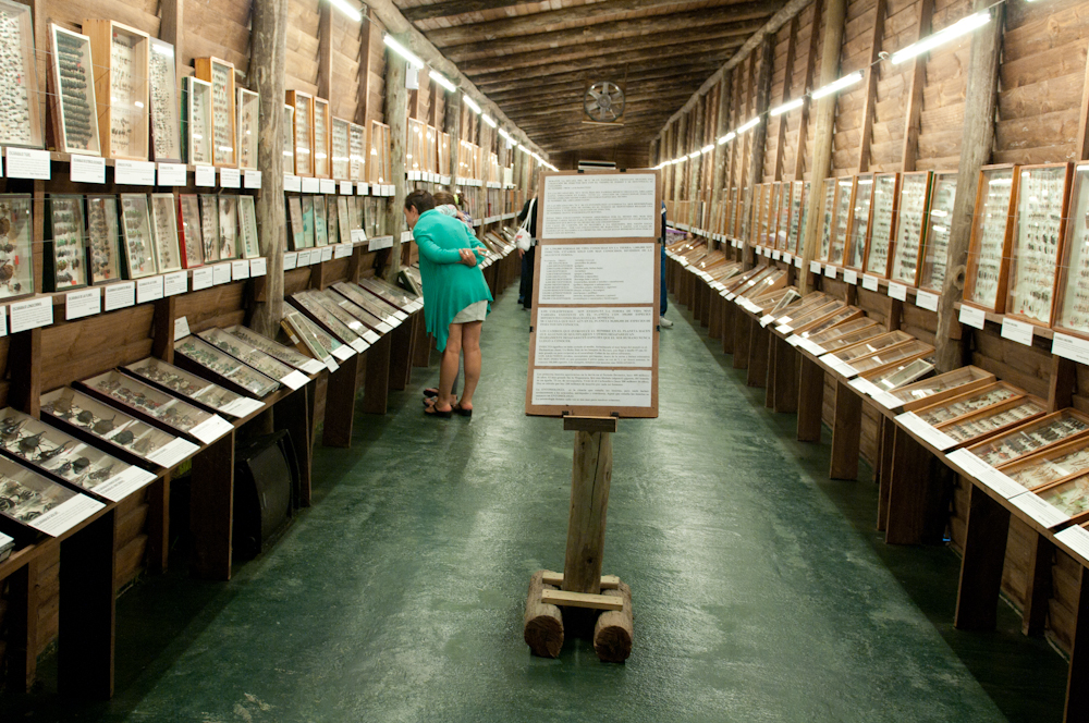 Sala de insectos en el Museo del mar correspondiente a nuestro INSECTARIUM